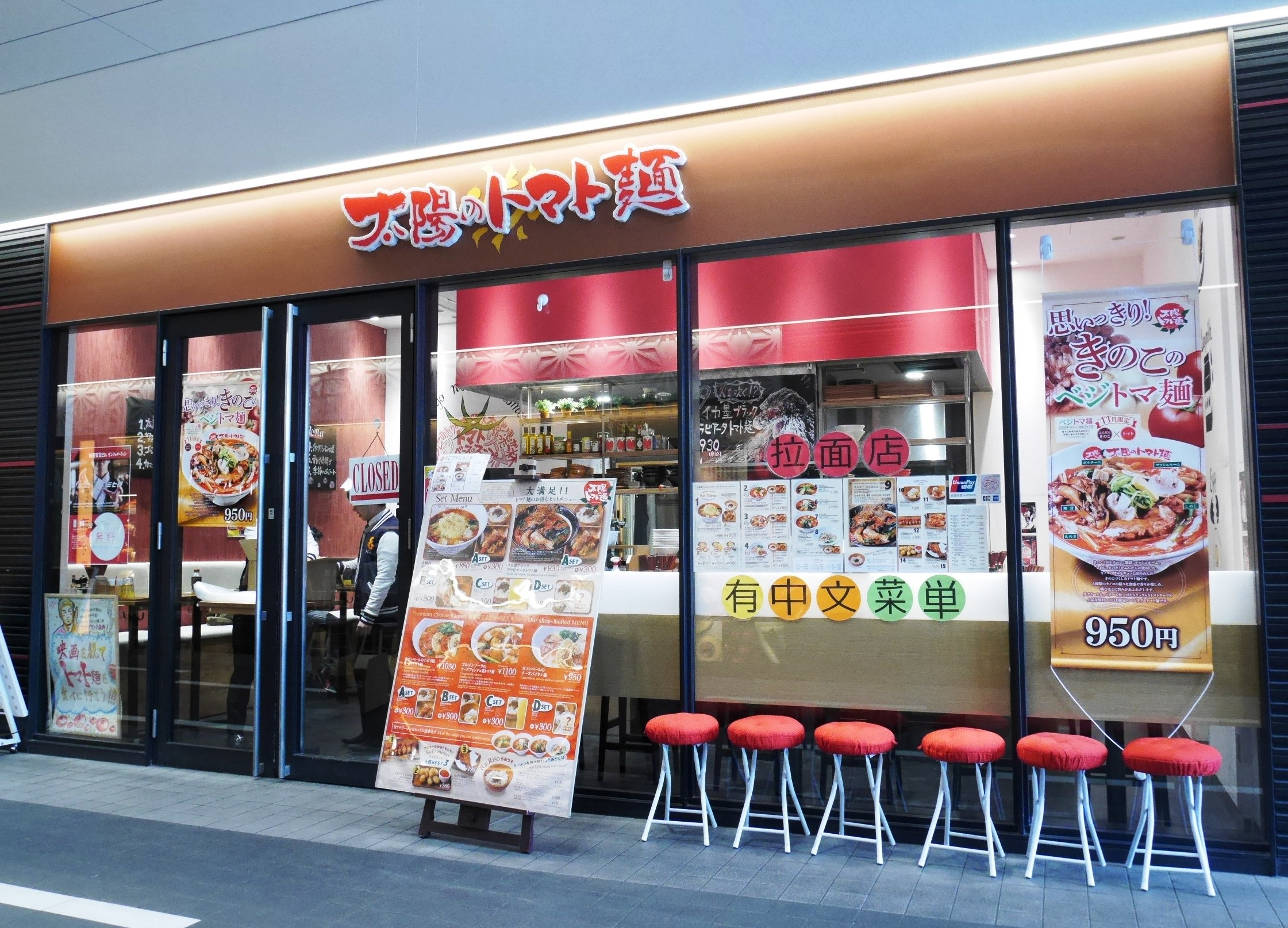 新宿東宝シネマ（商業施設内）1F